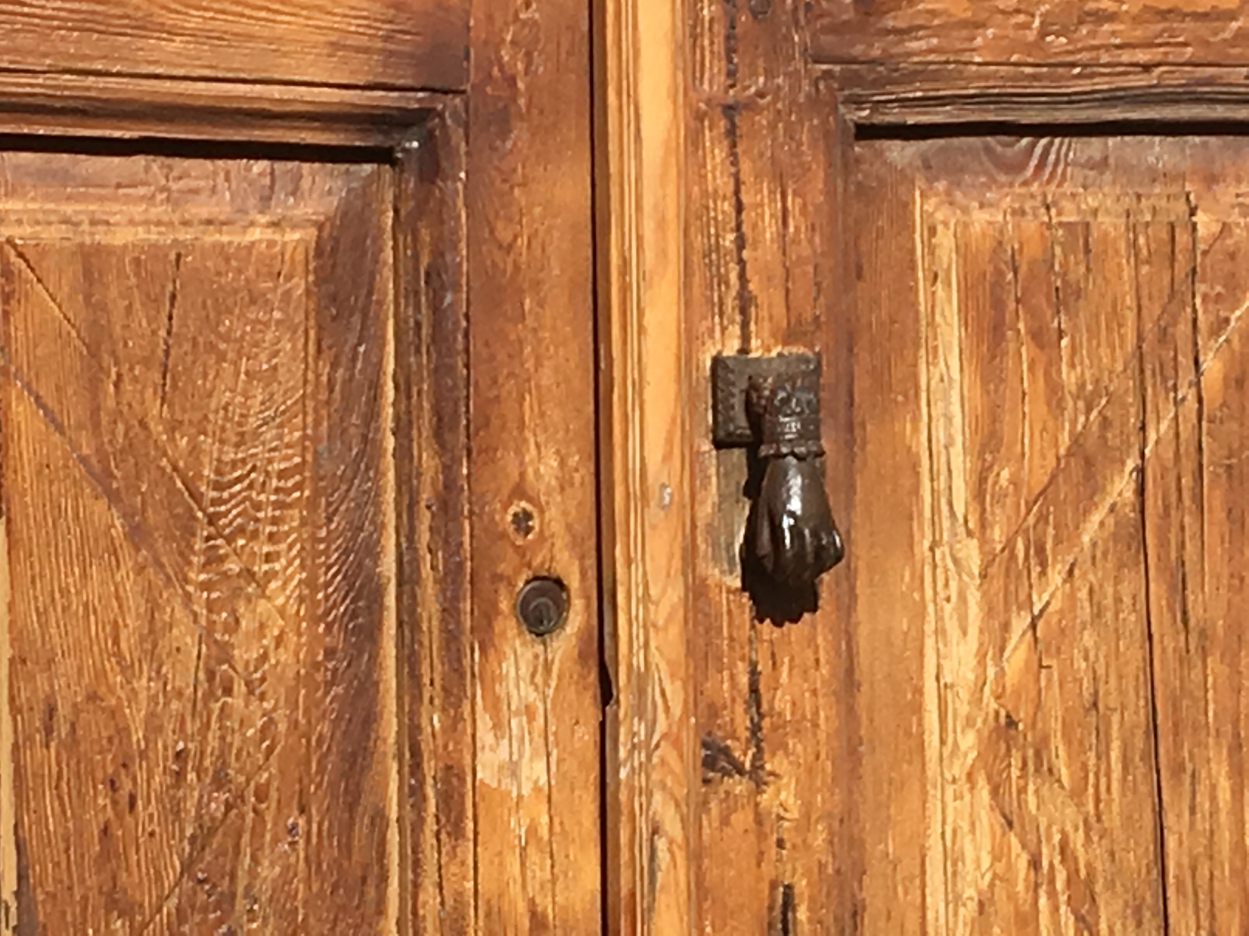 Villaesper Milenario